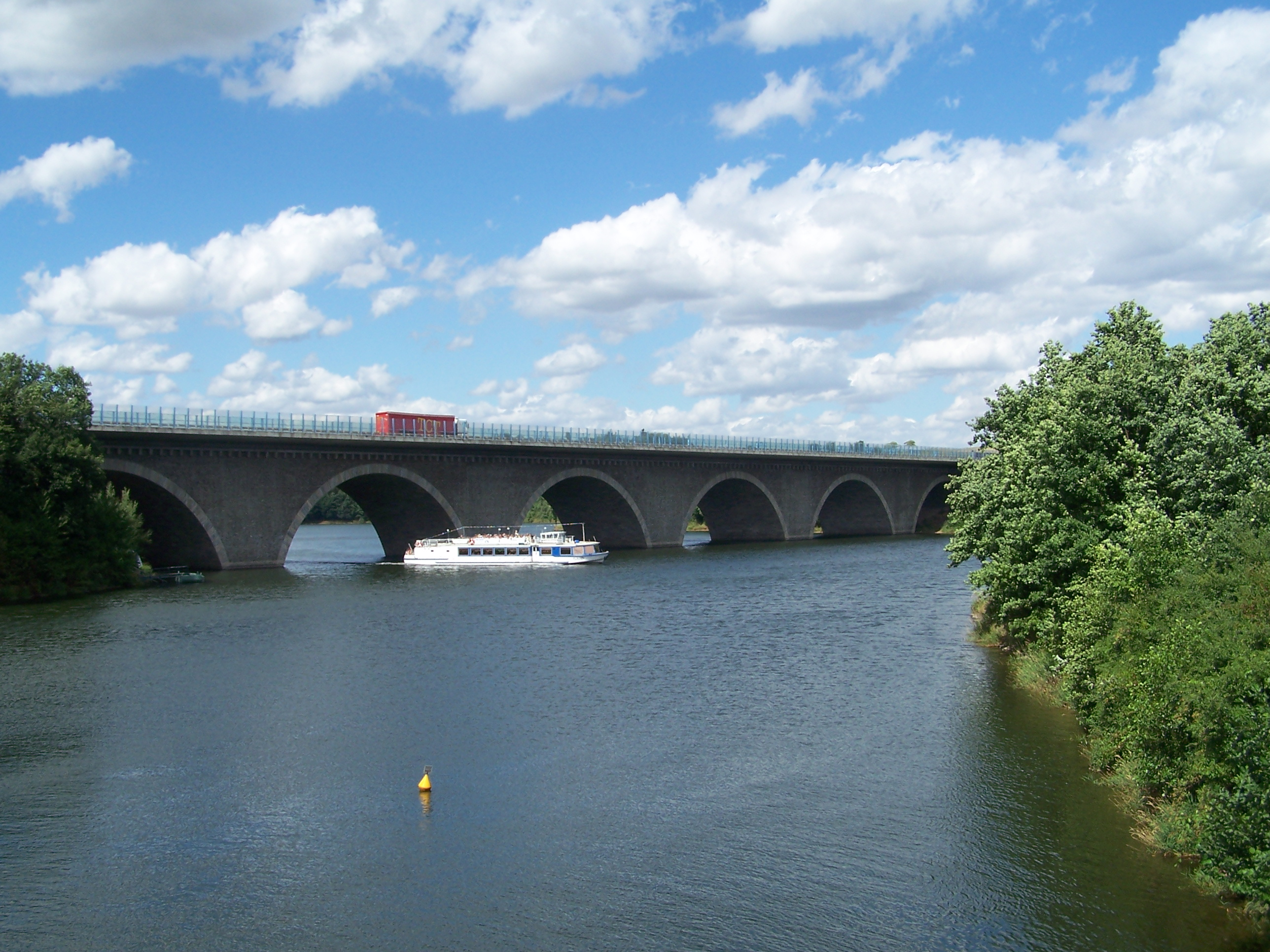 Autobahnbrücke über die Talsperre Pöhl; Fahrgastschiff der Serie BIfa Typ III; entweder Schiff 'Plauen'(1980) oder 'Pöhl'(1977)